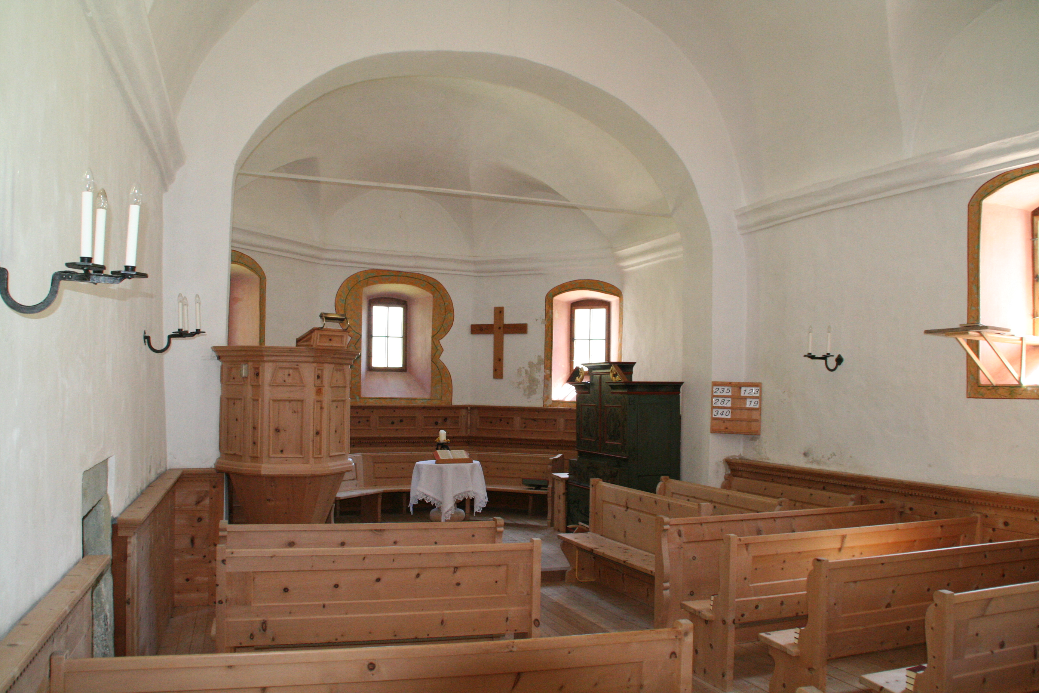 Innenraum